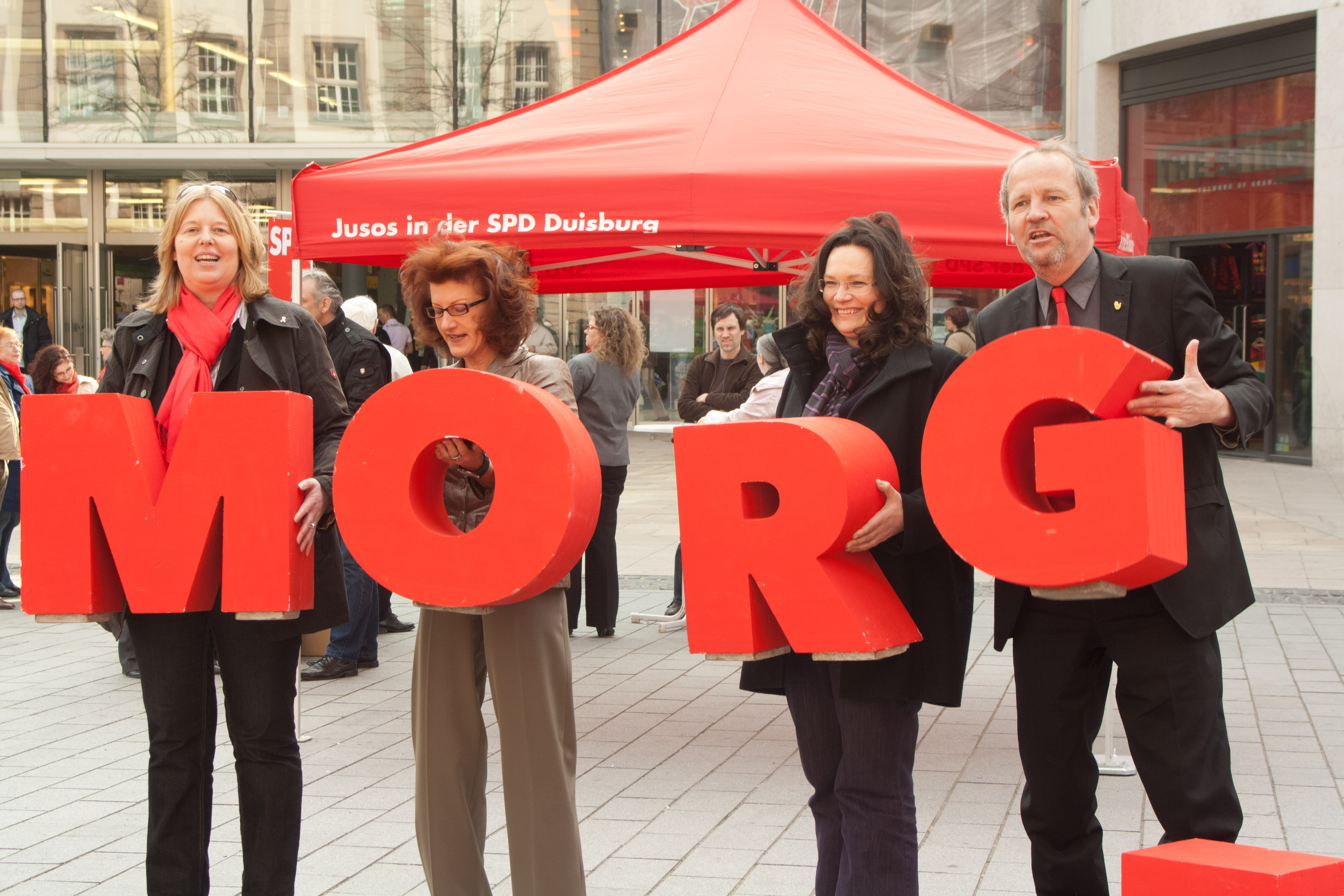 Bärbel Bas, Gisela Walsken, Andrea Nahles, Rainer Bischoff, SPD, NRW, Duisburg